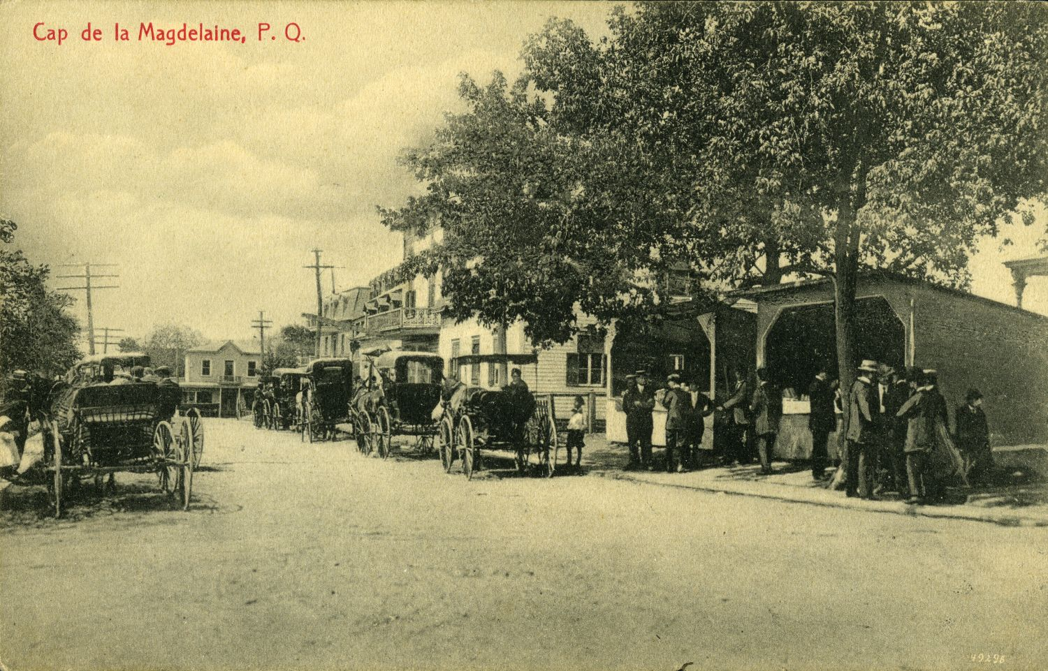 Cap de la Magdelaine, carte postale, Pierre-Fortunat Pinsonneault